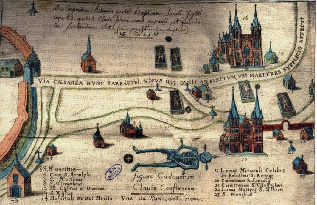 La Via_Caesare_actuelle rue du Babâtre_sur le plan de don_Mabillon, Ms 1878 de la BM de Reims.